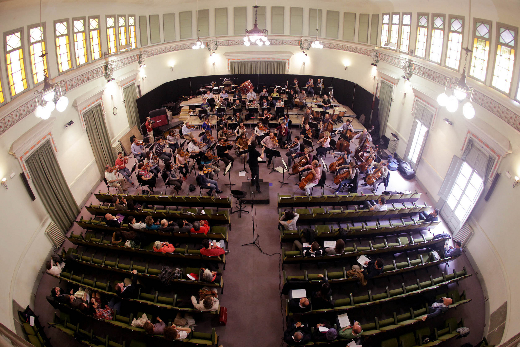 Concert de l'Orquestra Simfònica del Vallès a la presentació de la 17a temporada del cicle concerts simfònics al Palau i la 26a temporada del cicle concerts simfònics a Sabadell 1